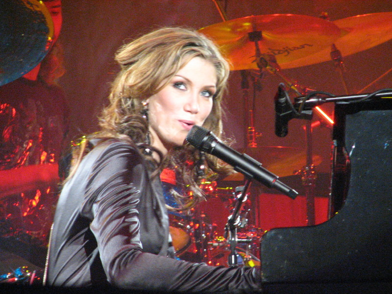 Delta0100.jpg